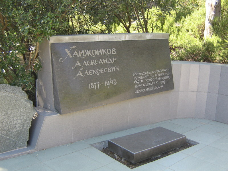 Надгобок Ханжонкова